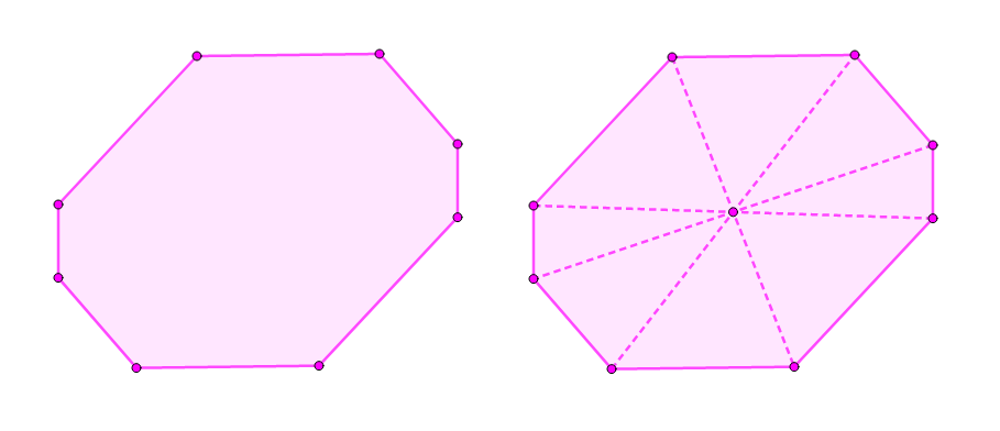 Слева - просто зоногон, справа проведены диагонали, показывающие центральную симметрию зоногона.